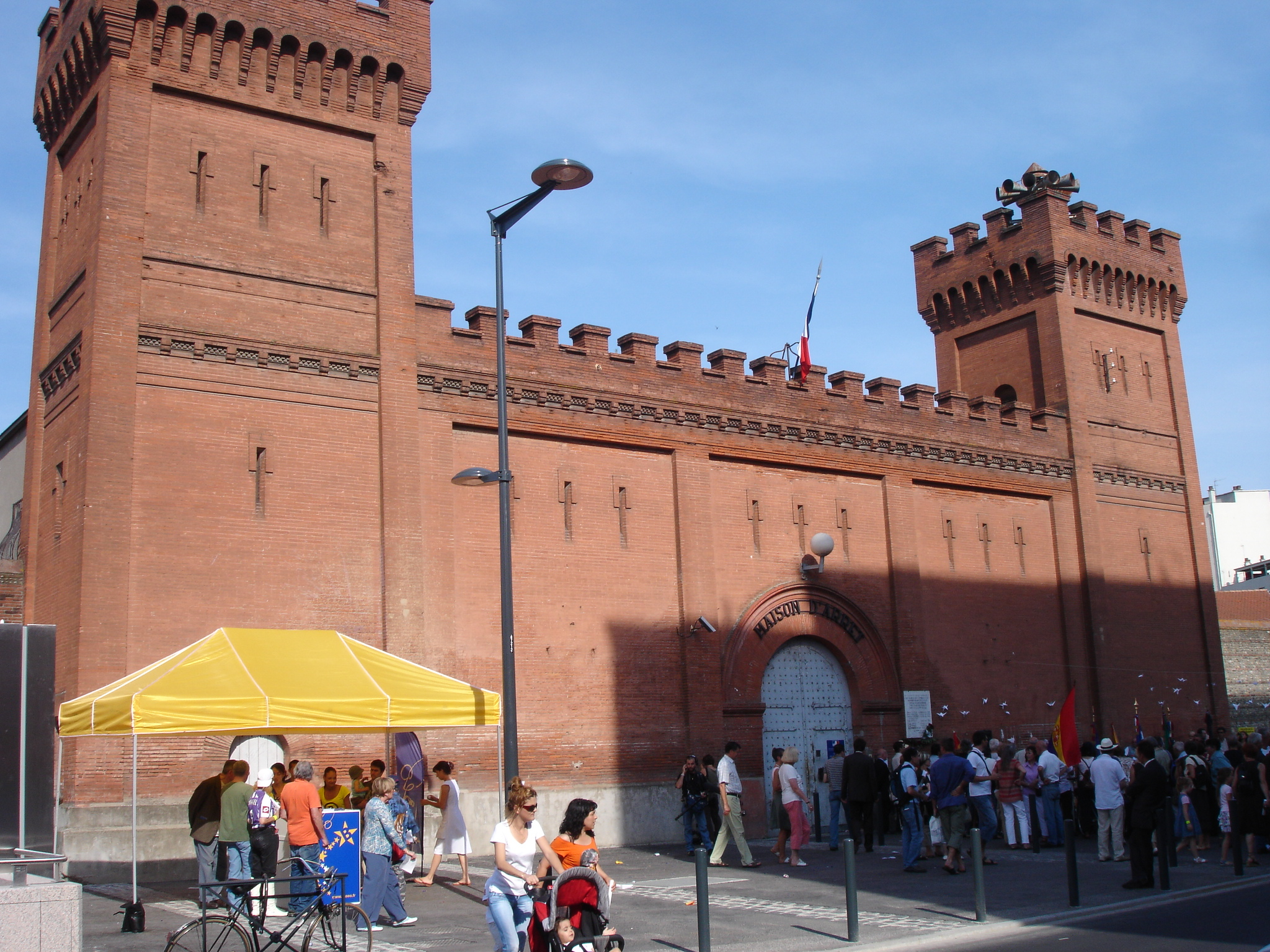 Toulouse (Haute-Garonne, France) - La Prison Saint-Michel.